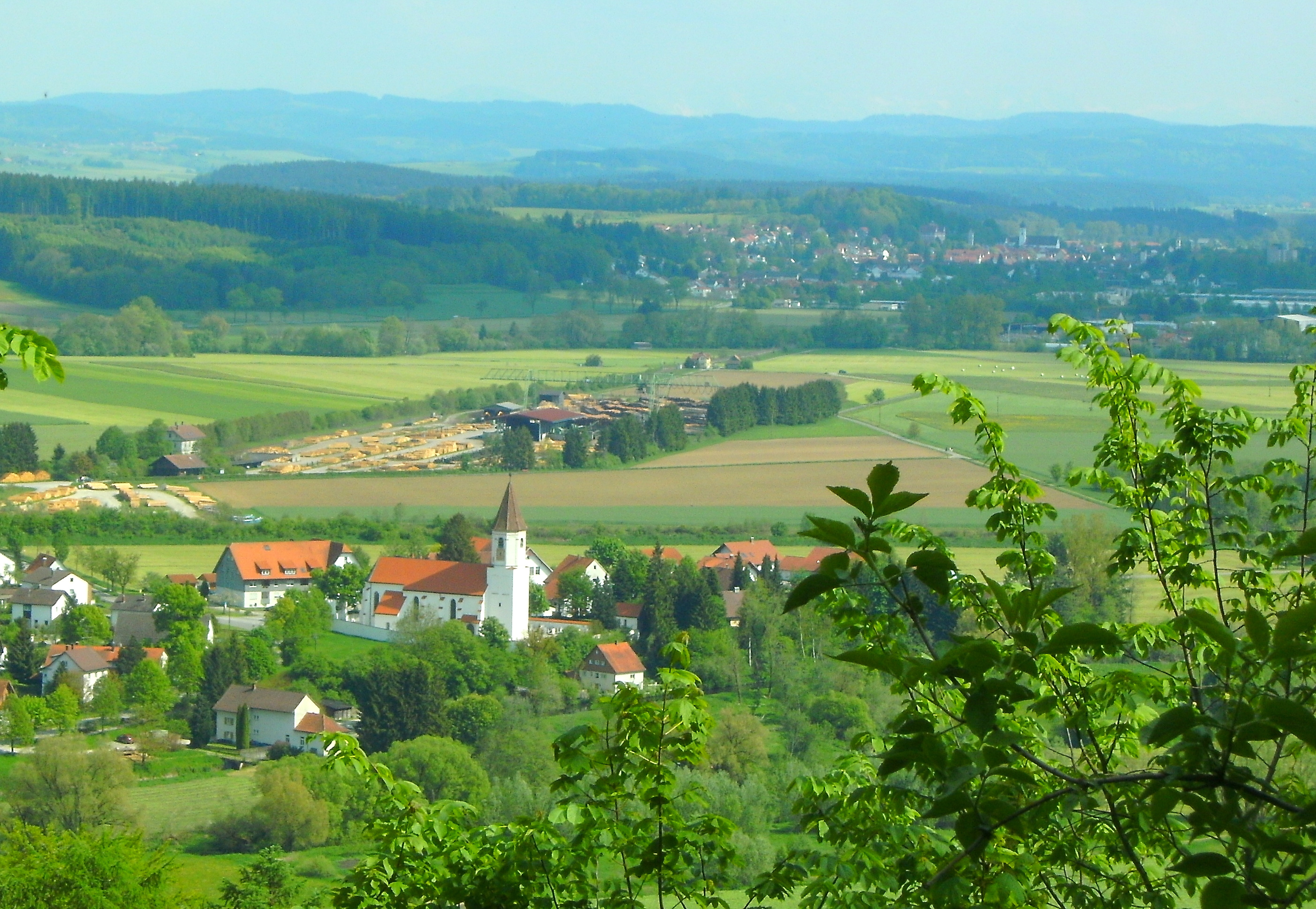 Unterzeil mit Filialkirche St. Magnus, im Hintergrund der Holzhof Zeil, von Schloss Zeil aus gesehen